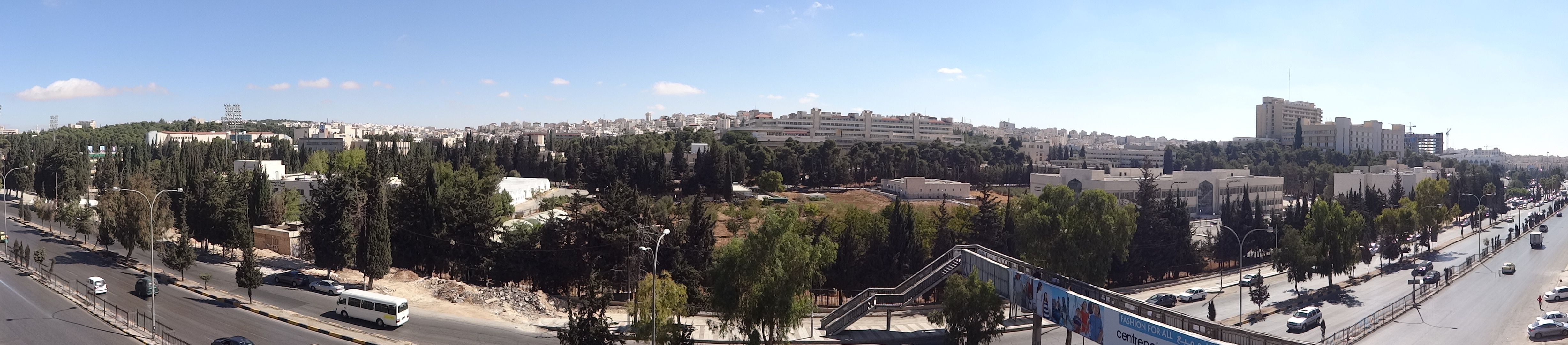 Queen Rania Street, Amman, Jordan